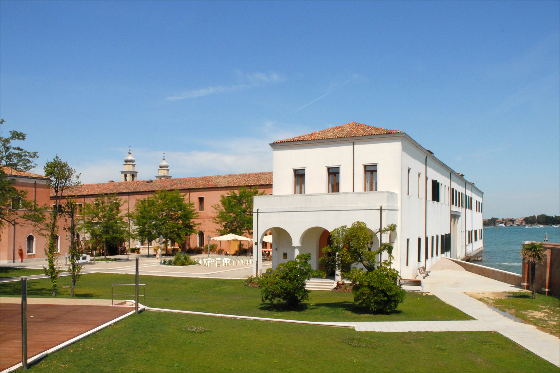 L'île San Servolo a abrité un couvent bénédictin au VIIIème siècle. Un hôpital militaire puis un centre psychiatrique y ont été construits à partir du début du XVIIIème siècle. Aujourd'hui, les bâtiments ont été rénovés et abritent, au sein d'un magnifique parc, un centre culturel, des ateliers artistiques et un centre de séminaire. Dans le cadre de la 53ème biennale de Venise, le pavillon de San Marino a été installé sur l'île ainsi que des évènements collatéraux.